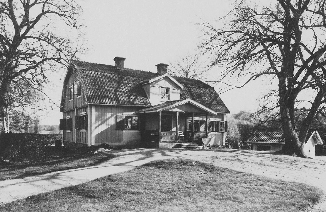 Listuddstorpet vid Flaten